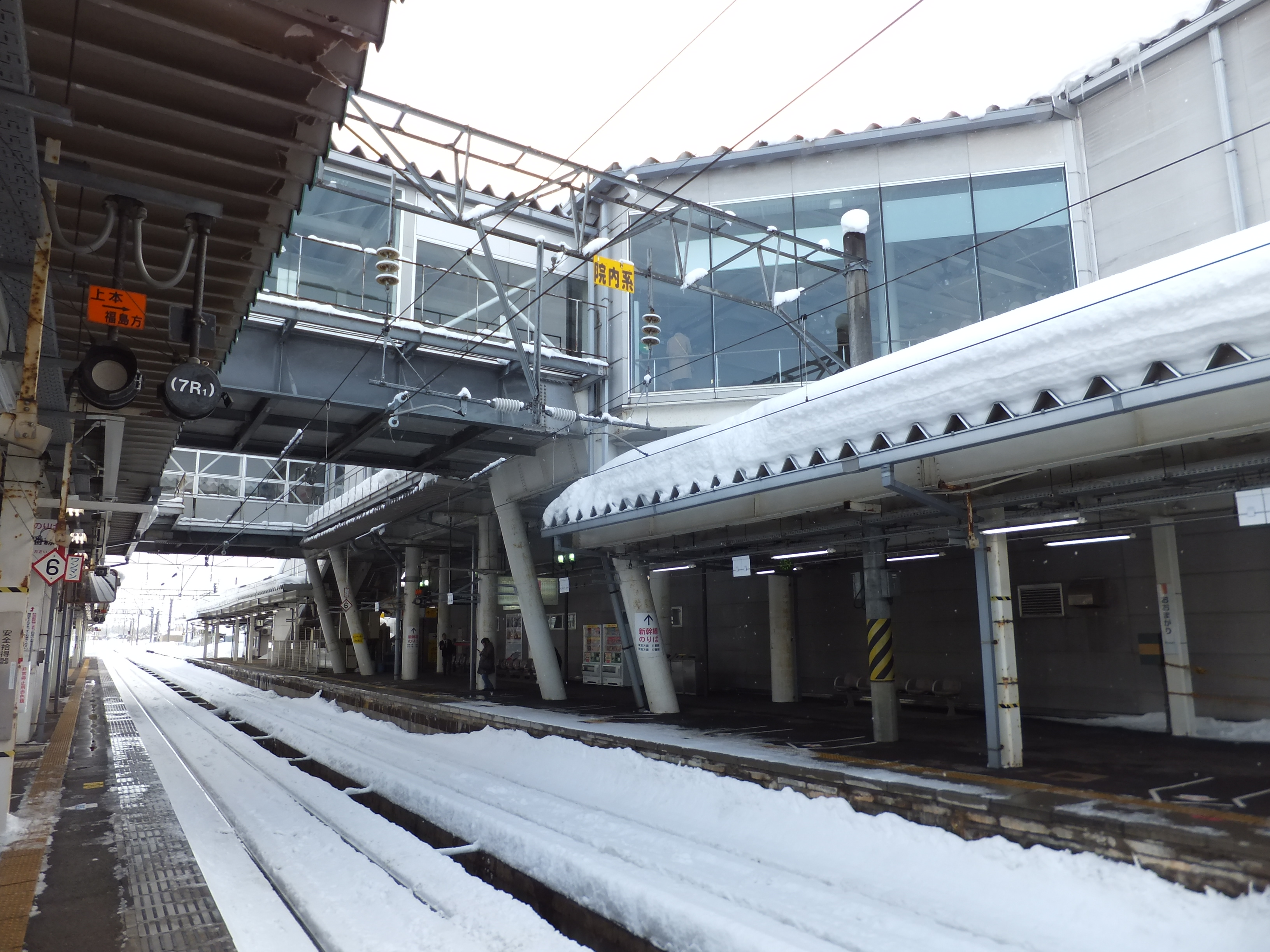 大曲駅2番ホーム